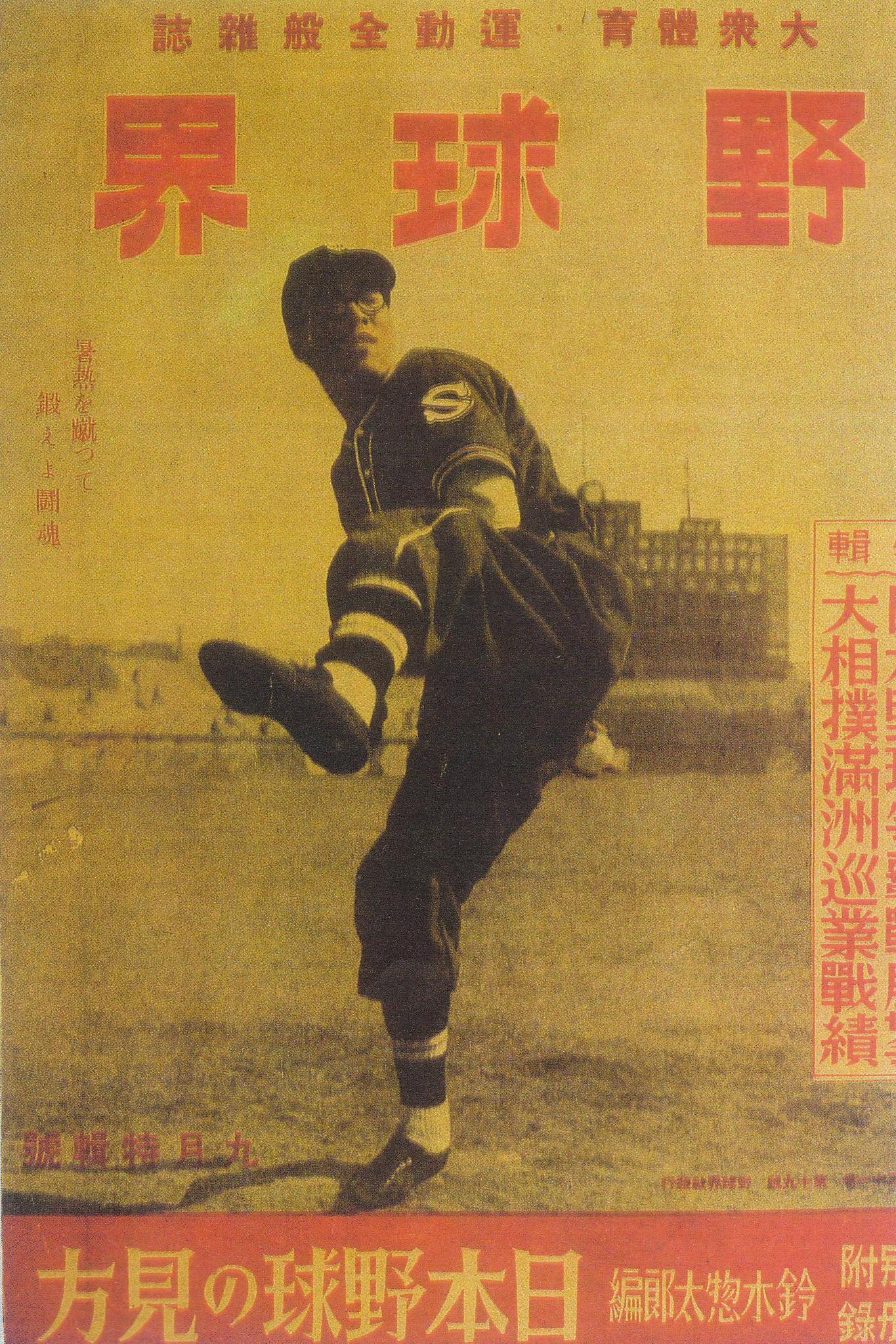 日本の野球雑誌『野球界』1941年9月号表紙。